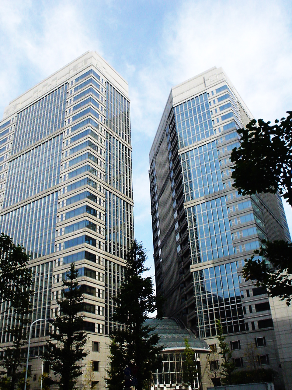 Otemachi First Square, Tokyo, Japanファーストスクウェア